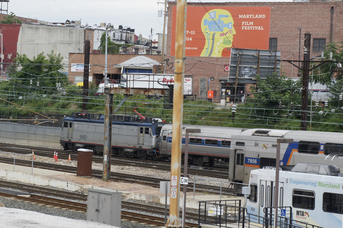 離開巴爾的摩賓州車站南下的東北區域號